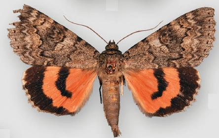 Catocala diantha